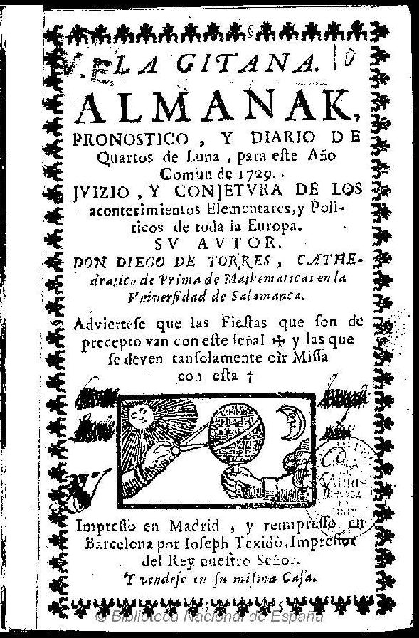 La gitana : almanak, pronostico, y diario de quartos de luna, para este año comun de 1729 : juizio, y conjetura de los acontecimientos elementares, y politicos de toda la Europa su autor Don Diego de Torres ... ; adviertese que las fiestas que son de precepto van con este señal [Cristus] y las que se deven tan solamente oír missa con esta † Autor: Torres Villarroel, Diego de (1693-1770) Fecha: 1729 Datos de edición: [Barcelona] Impresso en Madrid, y reimpresso en Barcelona por Ioseph Texidó ... y vendese en su misma casa